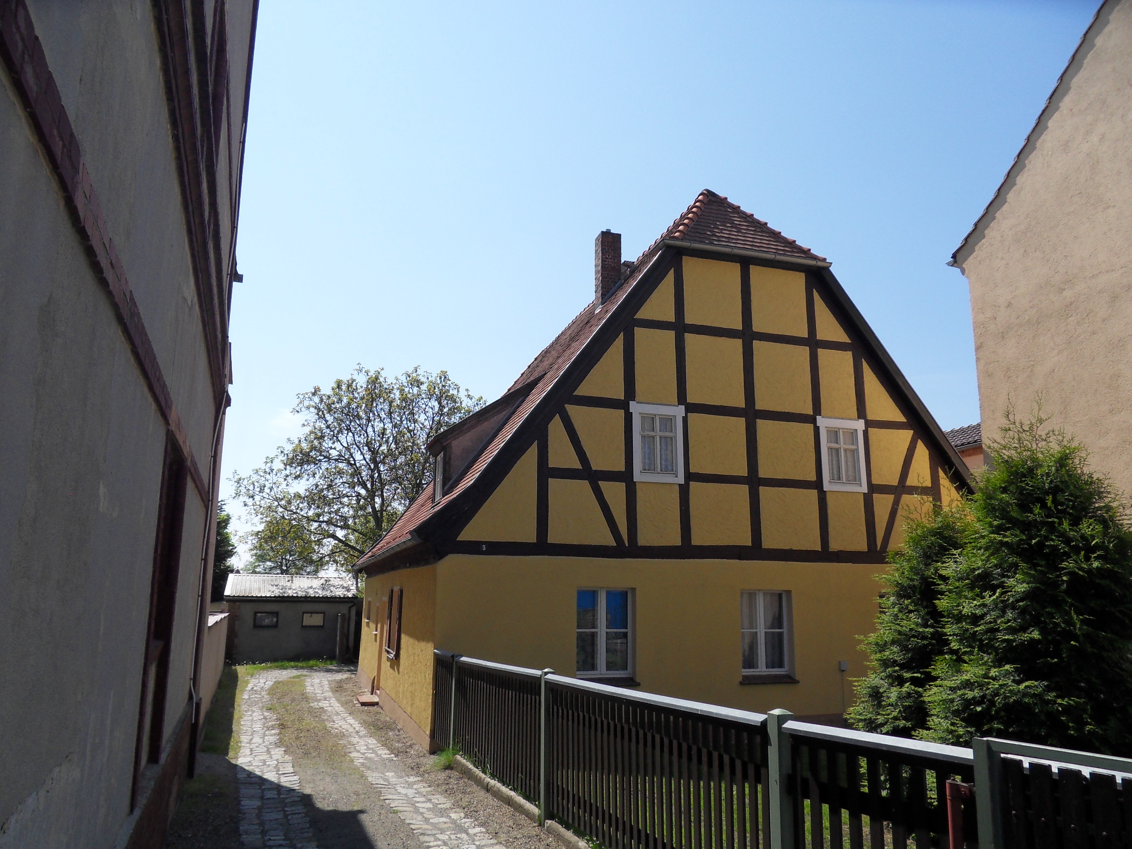 Denkmalgeschützte Schäferei am Dietrich-Heßmer-Platz in Lauchhammer-Mitte